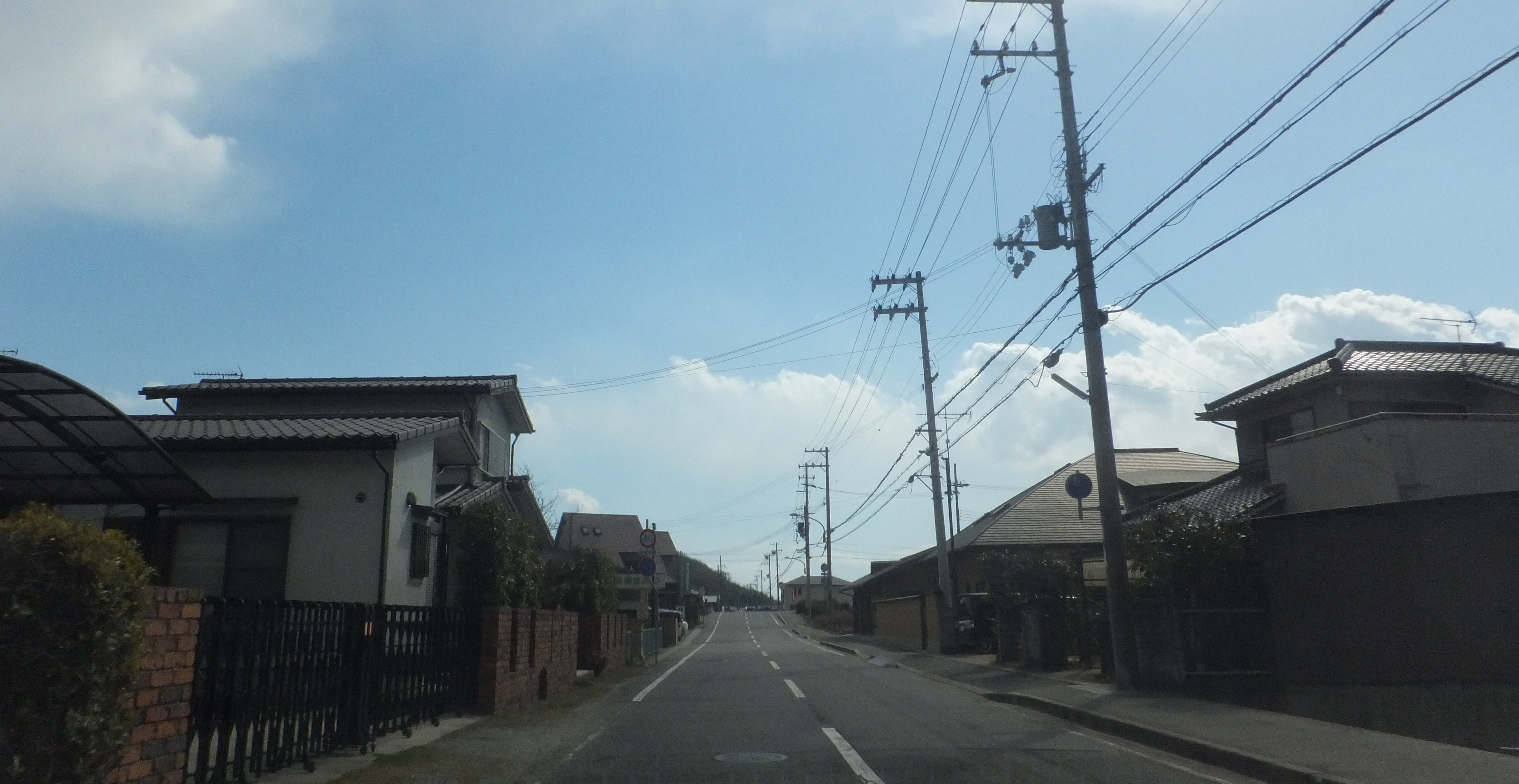 兵庫県たつの市御津町黒崎 兵庫県道133号網干停車場新舞子線